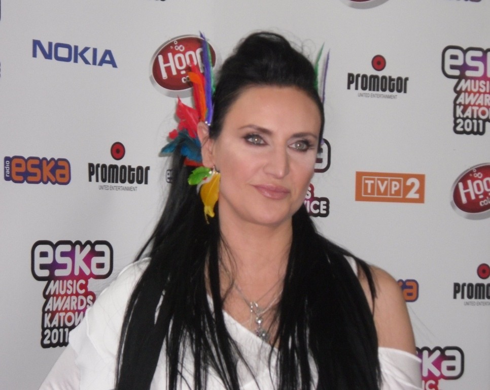 Zdjęcie zrobione podczas Eska Music Awards 2011 w katowickim Spodku.